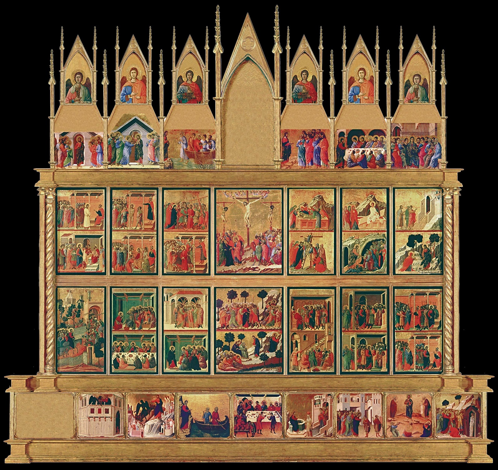 Maest_001_duccio_siena_duomo.